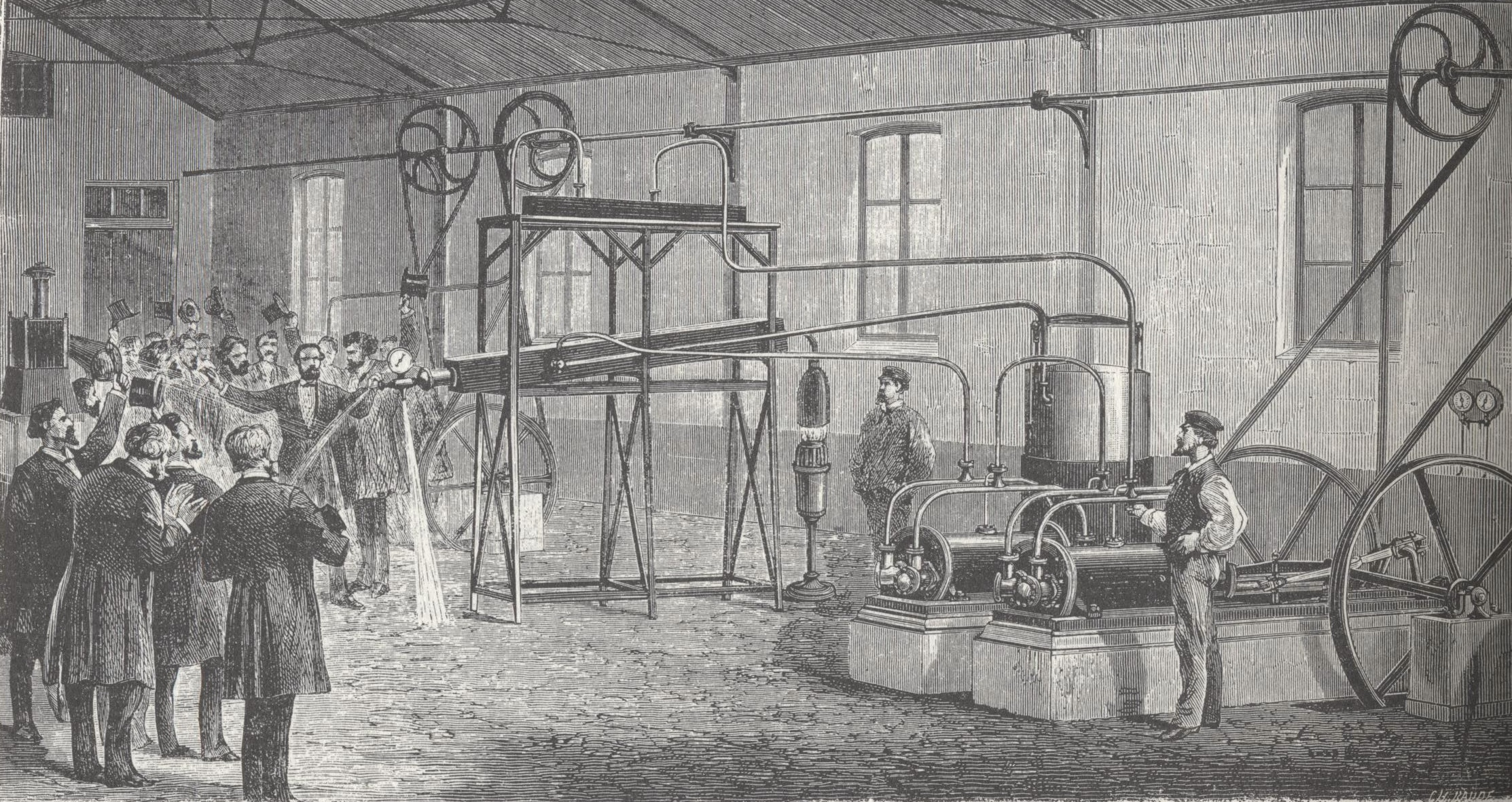 La liquéfaction des gaz dans le laboratoire de Raoul Pictet à l'Exposition universelle de Paris en 1878, d'après les croquis de Raoul lui-même (gravure sur acier de Ch. Baude, 170x315mm)